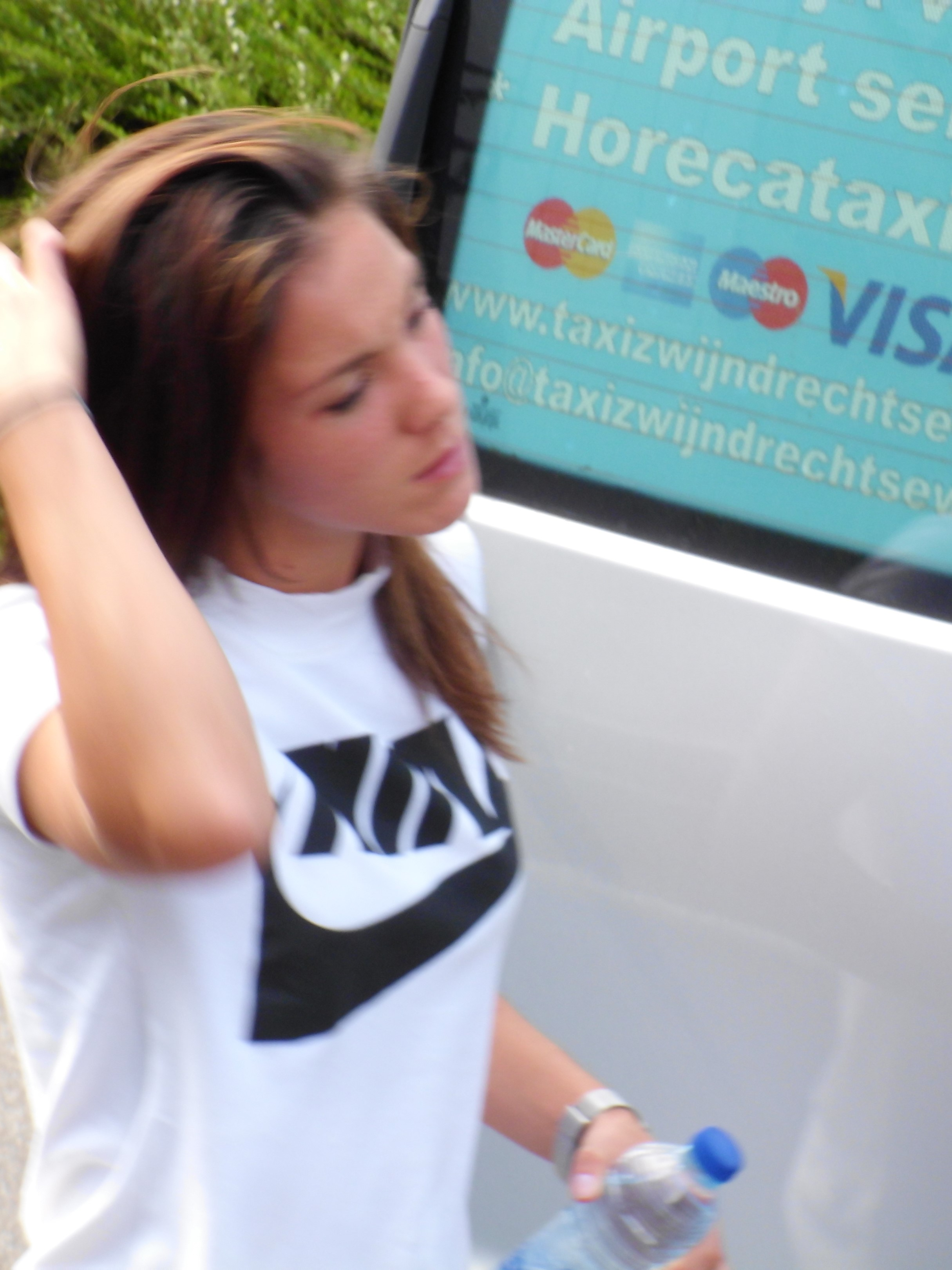 Clarisse Le Bihan vor dem französischen Teamquartier in Zwijndrecht während der EM 2017